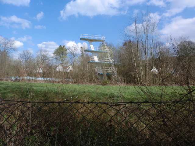 Sprunturm im Freibade Lübbecke